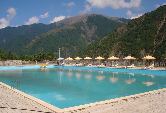 İlisu. Ulu dağ